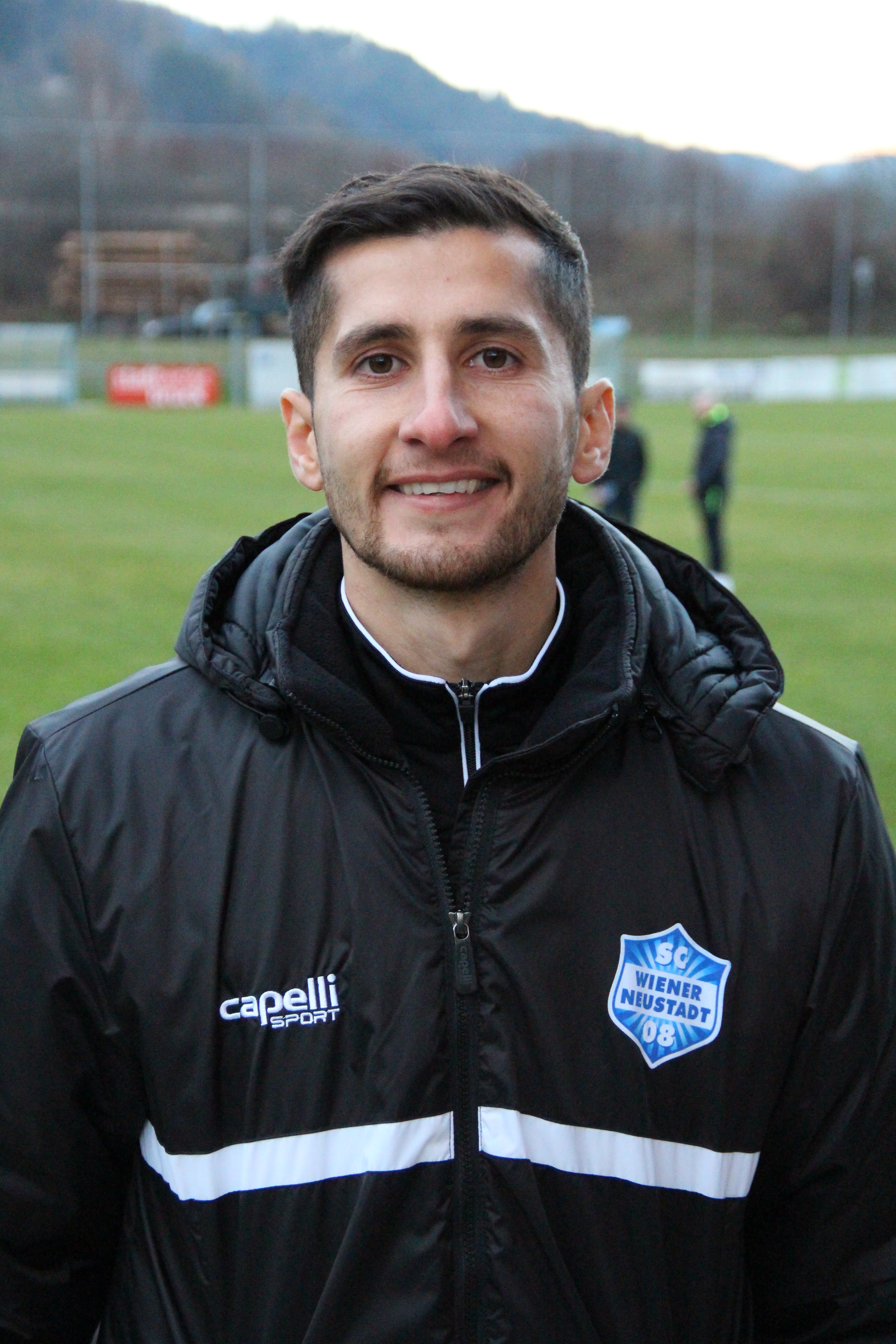 Sargon Duran (SCWN)